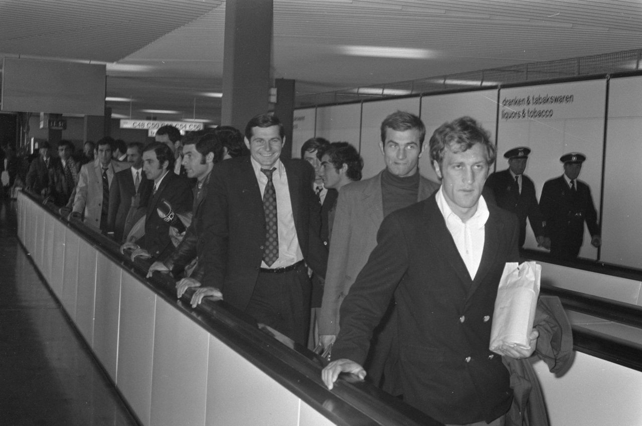 Elftal Dynamo Tbilisi op Schiphol, spelers van Dymano.